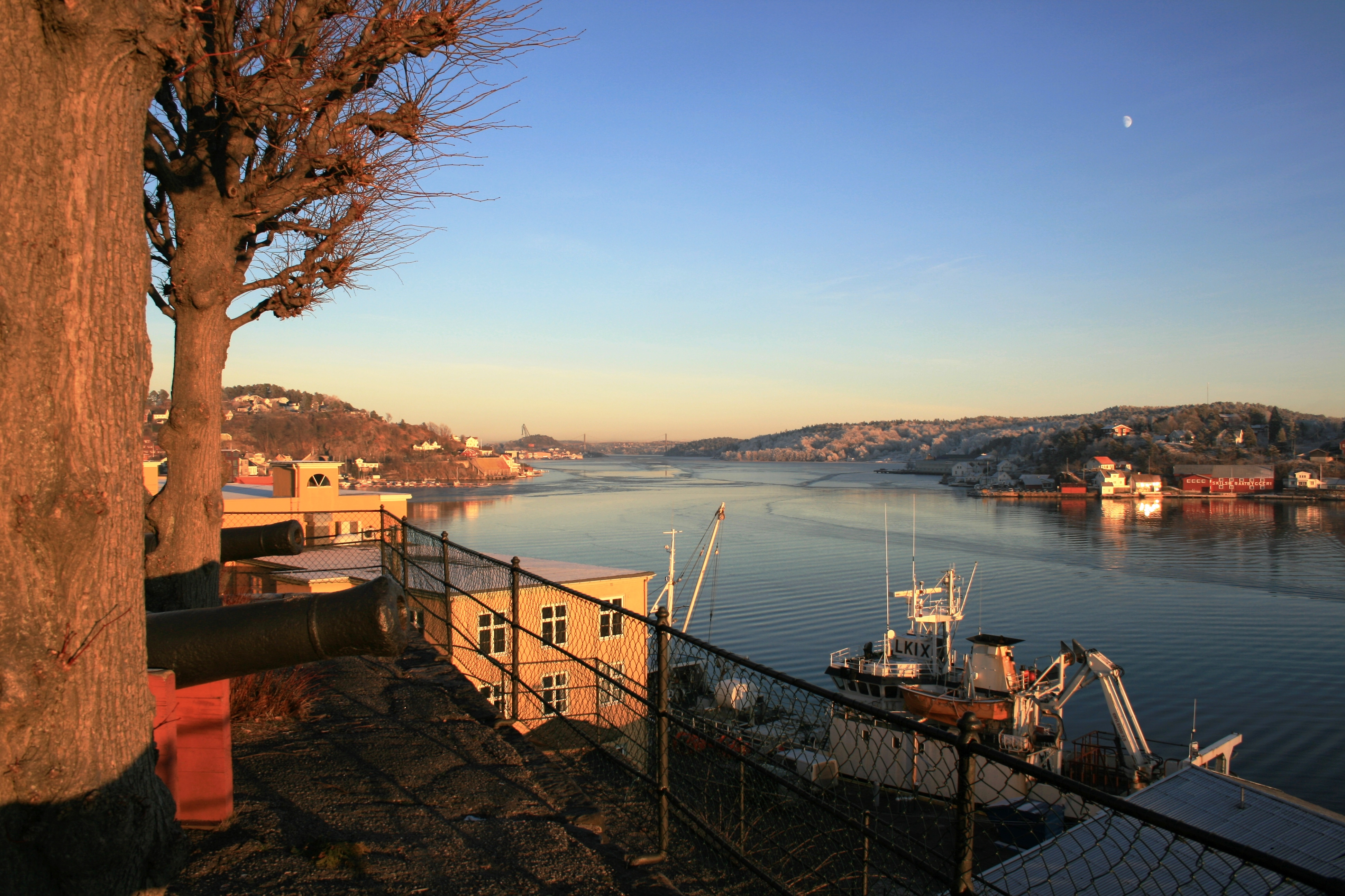 Batteriet i Arendal, Tromøysund med Tromøybroa